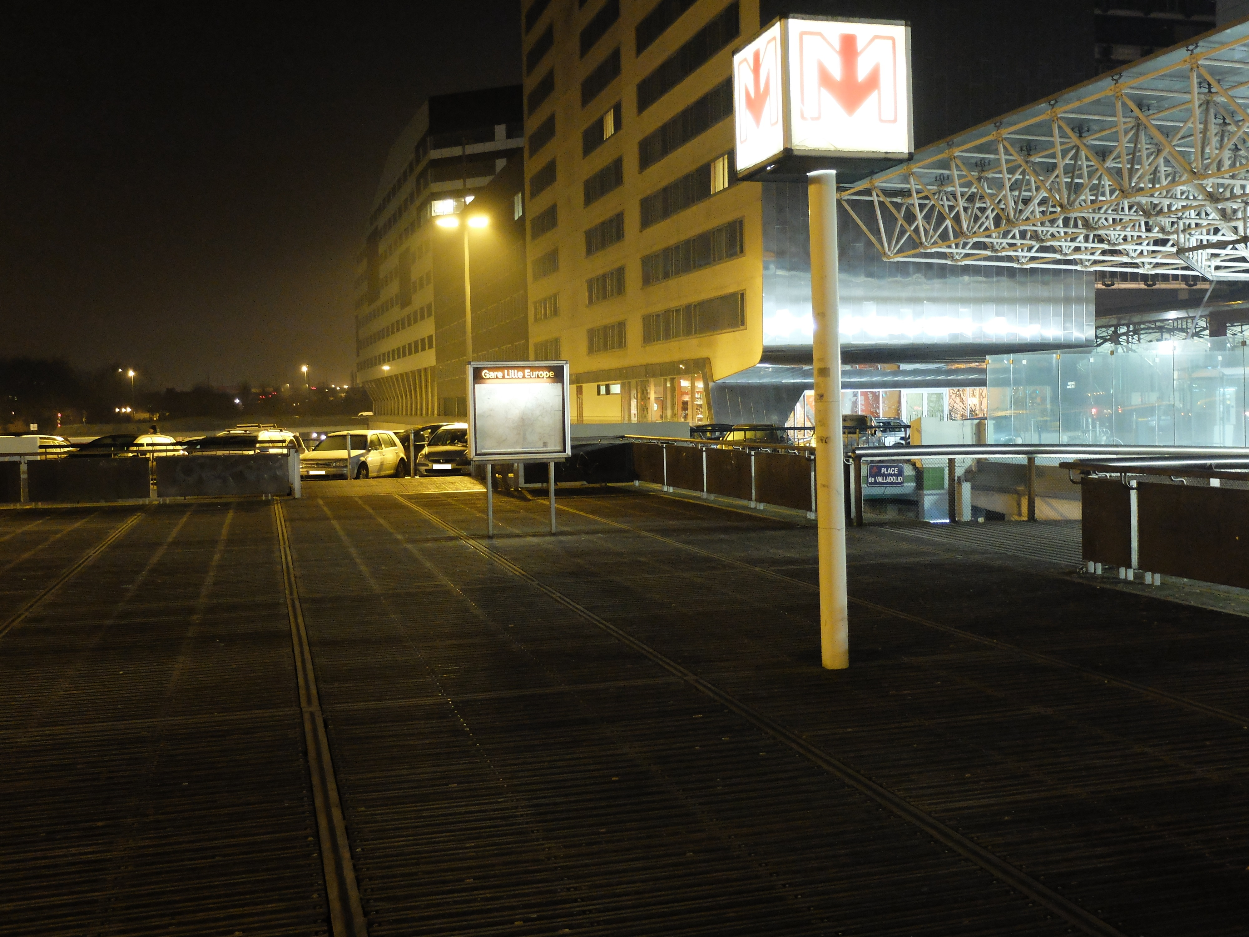 Vue de la station de métro "Gare Lille-Europe" à Lille.